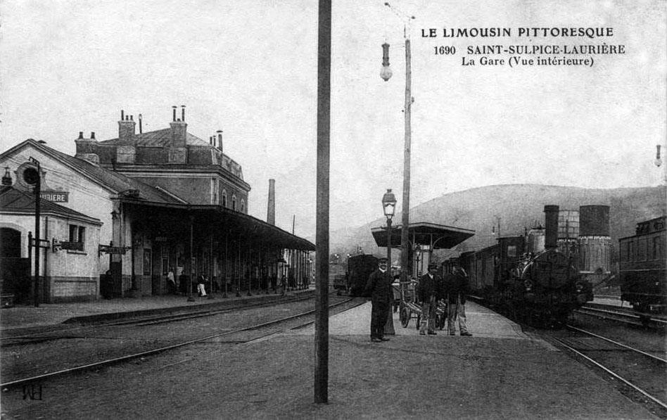 L'intérieur de la gare avec un train à vapeur au début des années 1900.